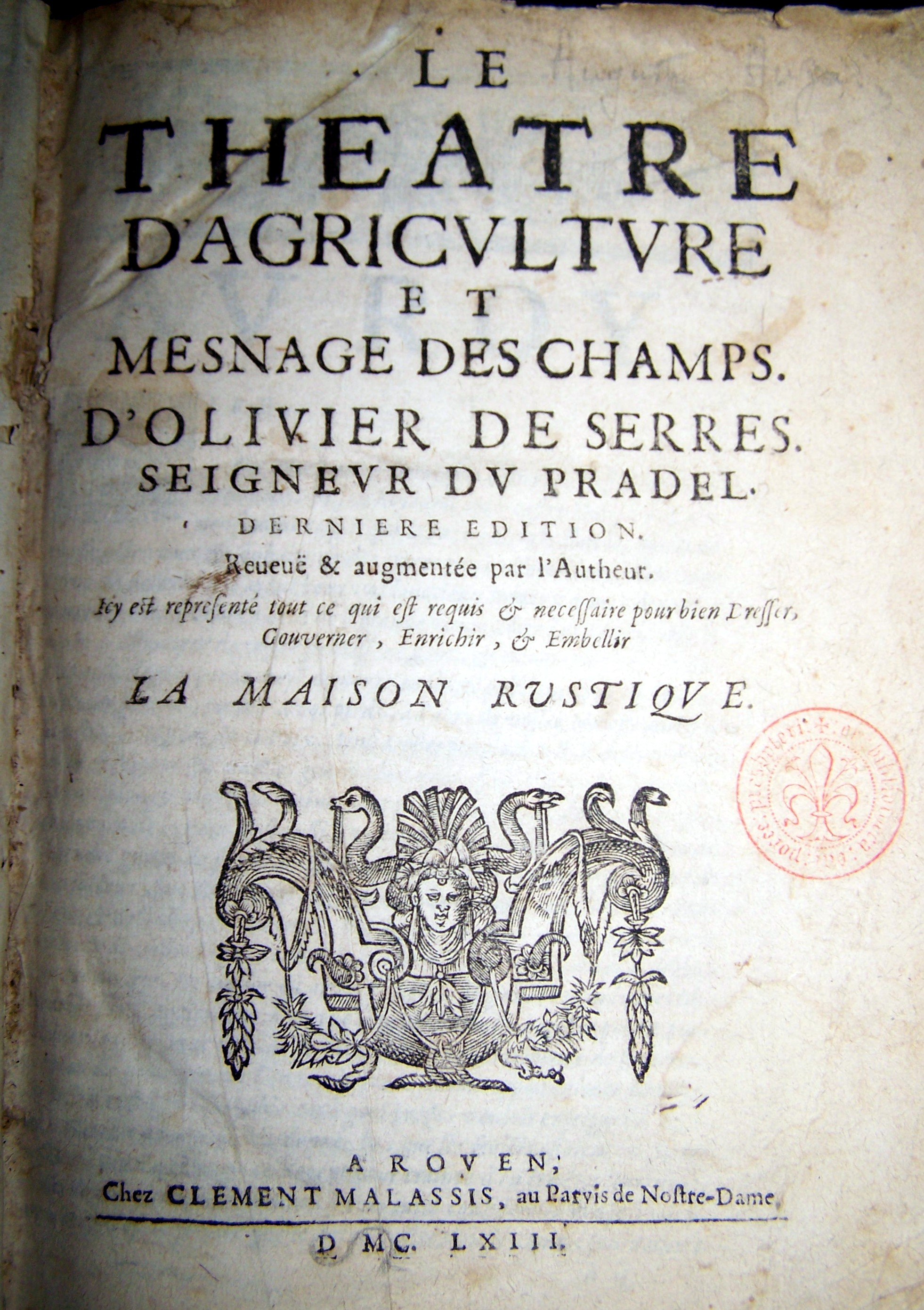 Le traite d'Olivier de Serres - edition de 1663 a Rouen.